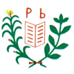 Brasão do Município de Boquira/Bahia